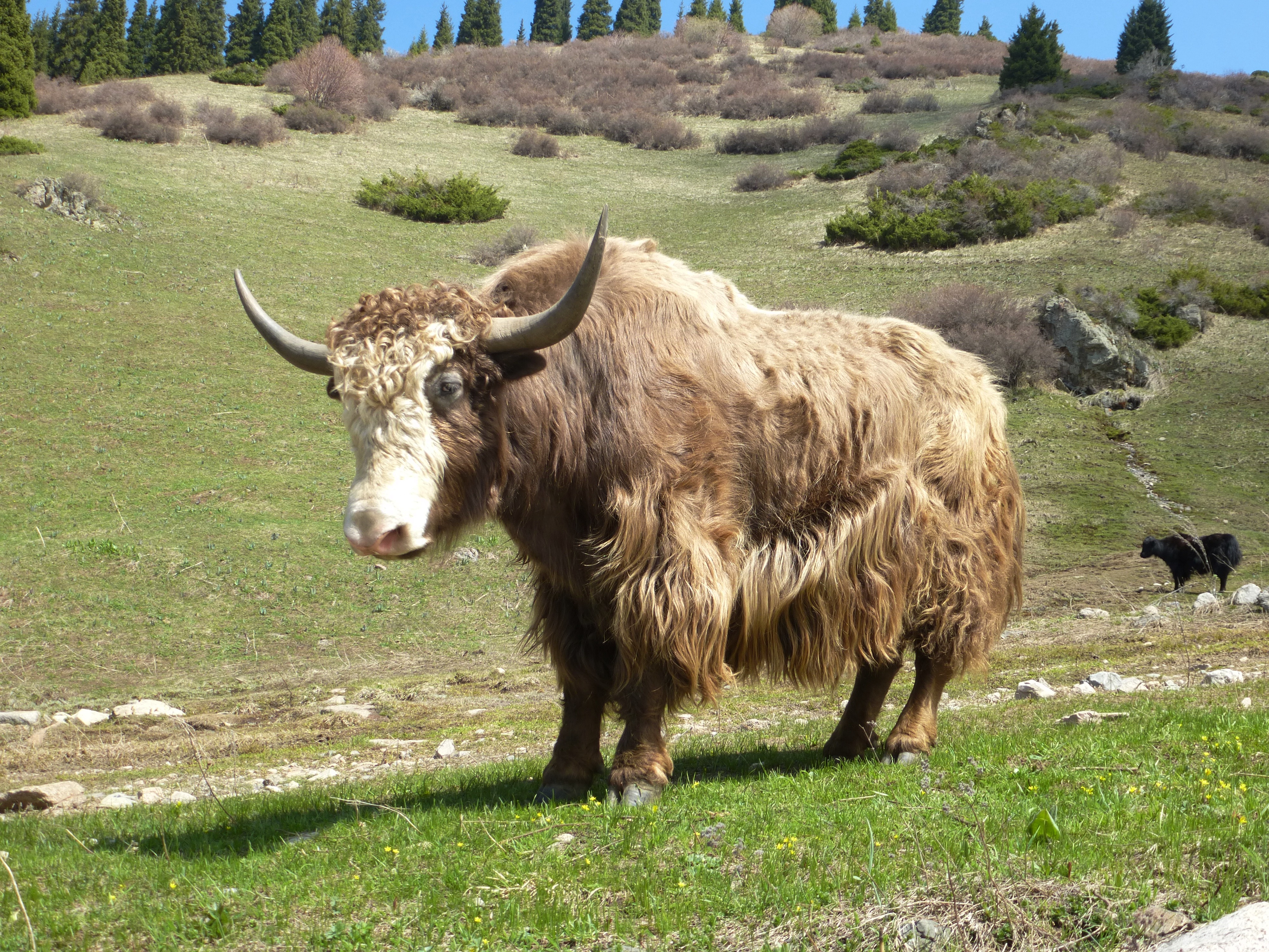 Як в горах Заилийского Алатау. Ущелье Ким-Асар. Окрестности Медео. Май 2014 года.